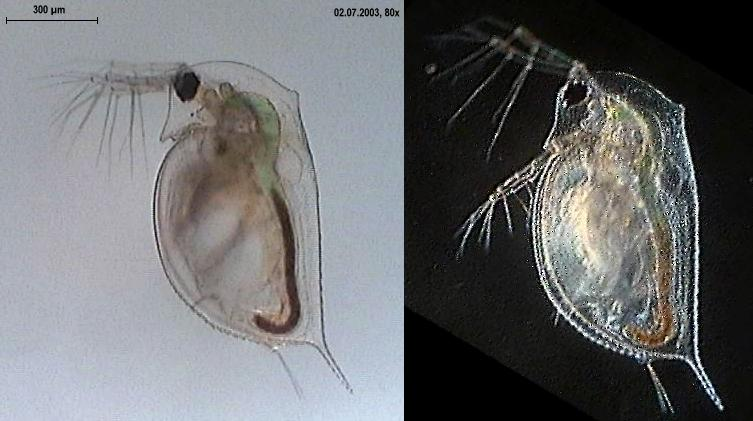 Daphnien (Krebstiere)